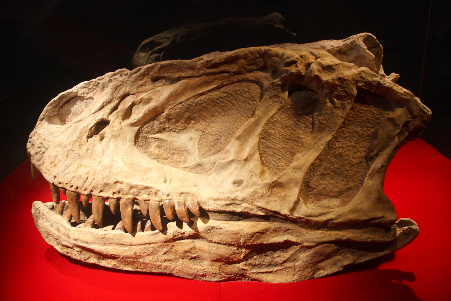 S. hepingensis Dinosaurmuseet i Zigong. -- The dinosaur museum in Zigong.